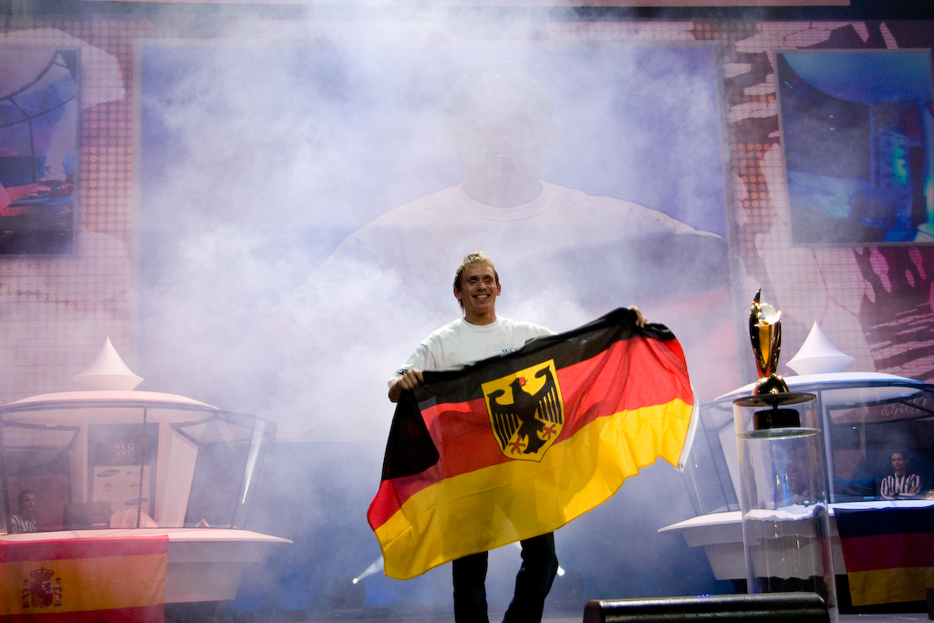 Daniel gewinnt die Wcg 2007